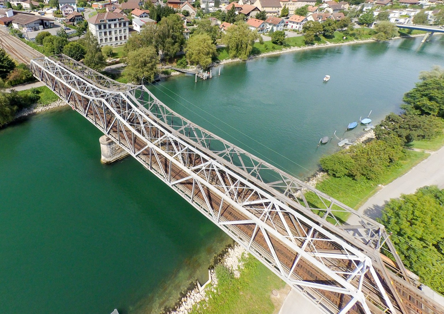 Stahl Eisenbahnbrücke über die Aare bei Brügg